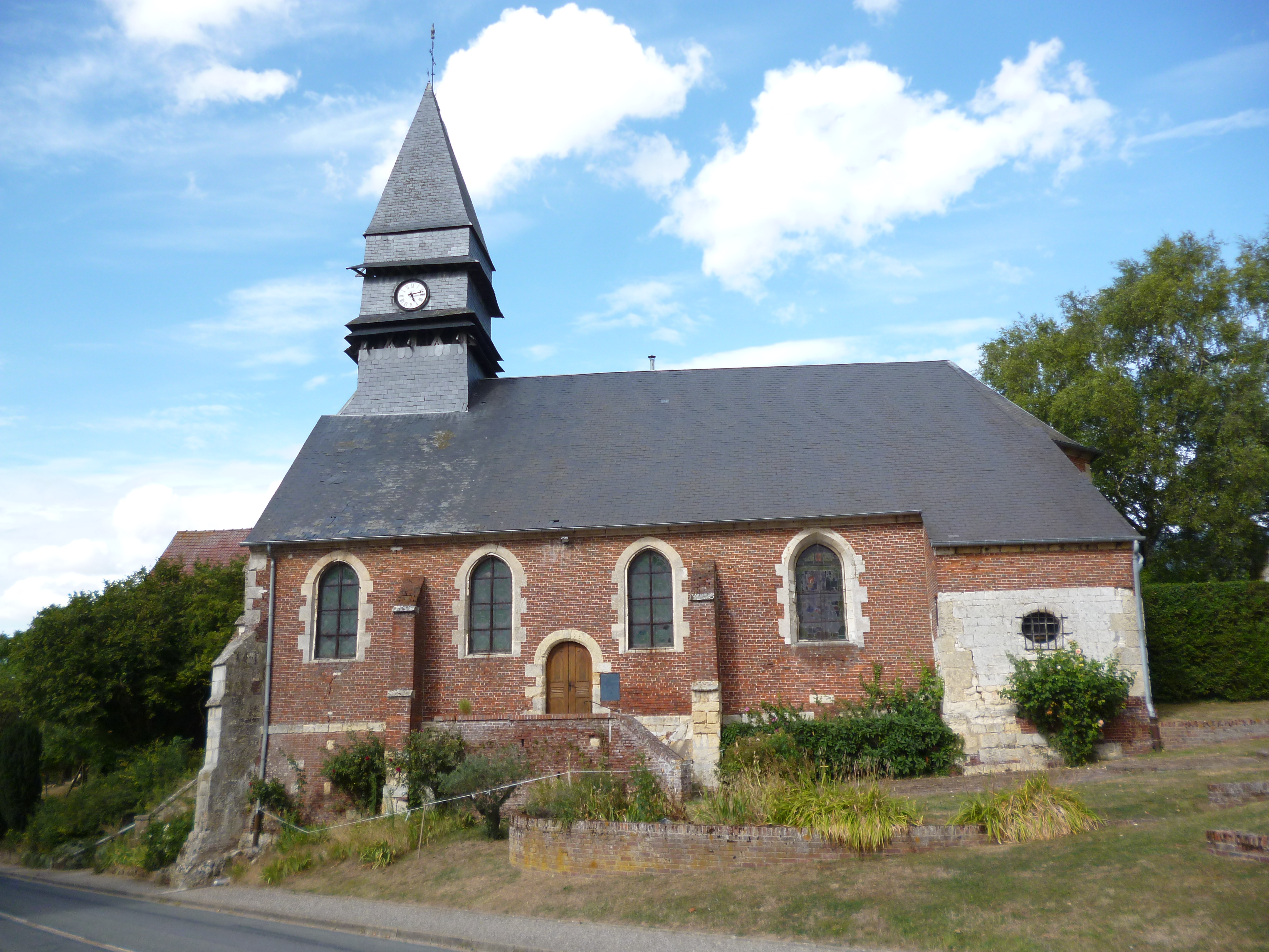 L'église Saint-Vaast de Nourard-le-Franc (Oise).